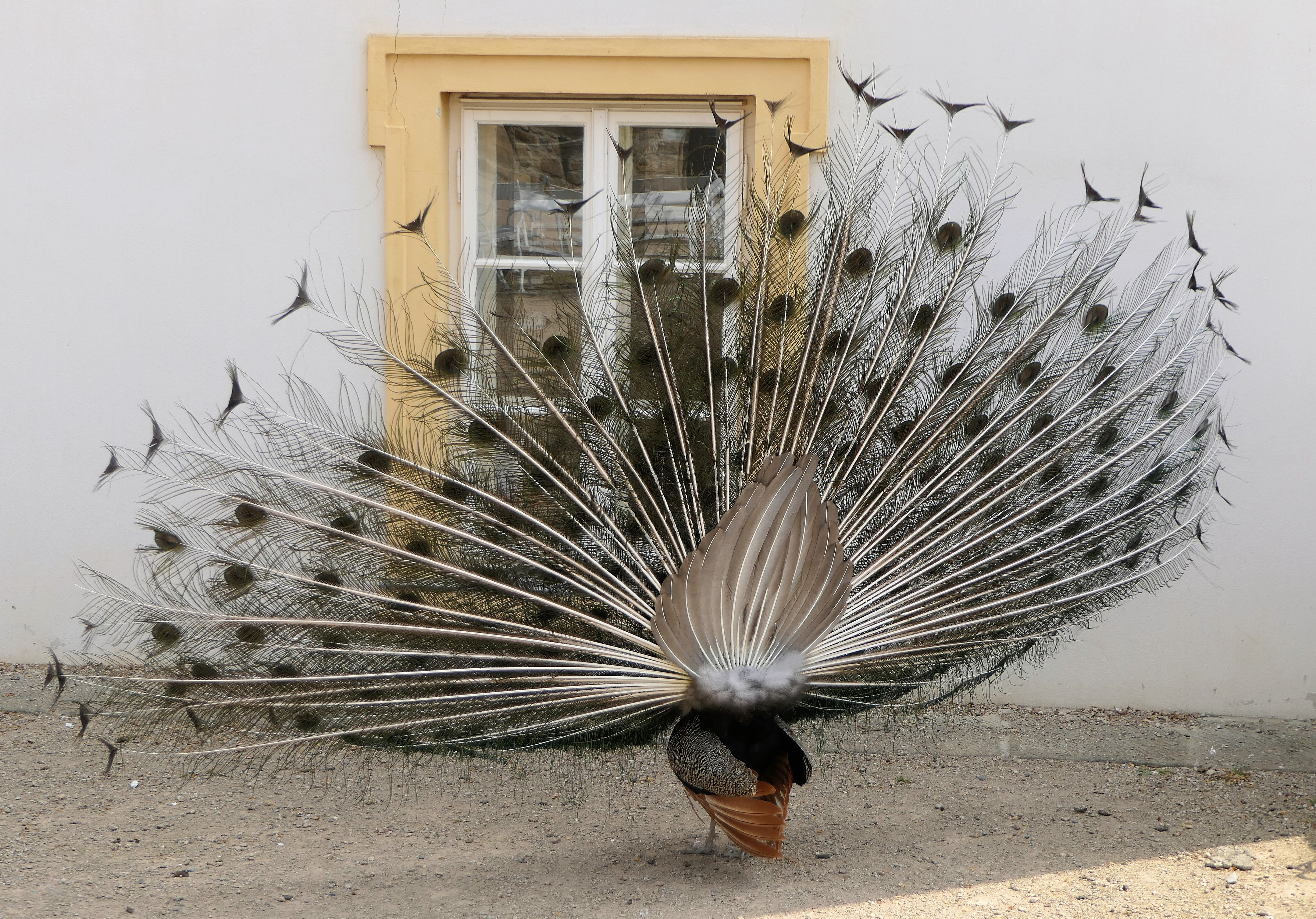 Blauer Pfau am Schloss von Decin - Balzender Pfauenhahn mit ausgebreiteter Federkrone von hinten